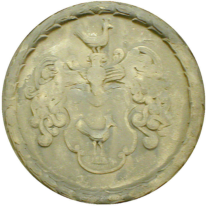 Vollwappen der Familie Trapp (von Trappensee) vom einstigen Sammeldenkmal der Familie in Heilbronn